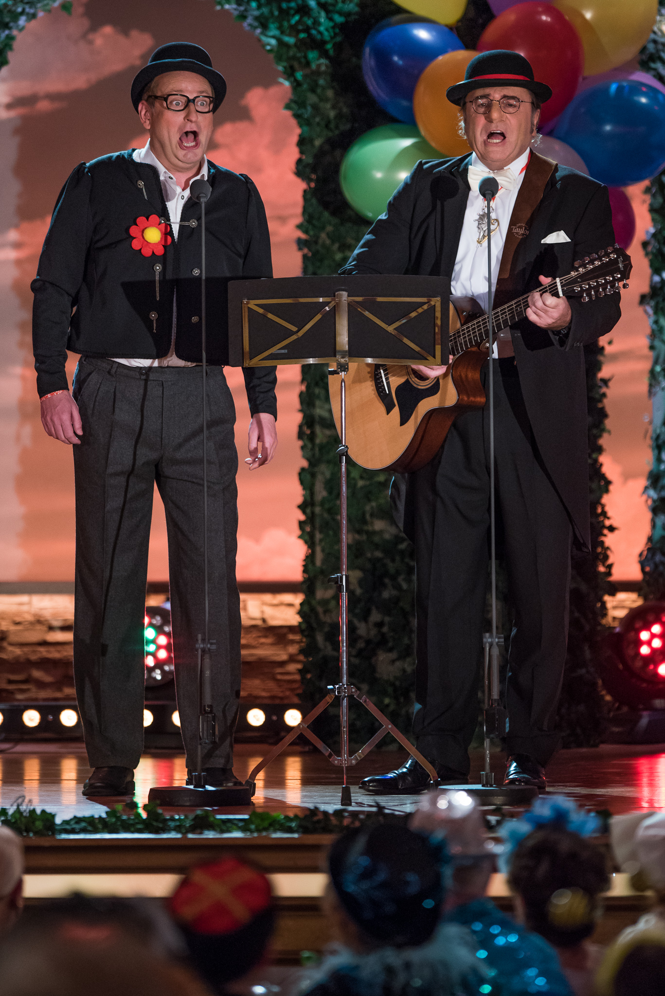 BR,Bayerisches Fernsehen,Bernhard John Händel,Fastnacht in Franken,Fastnachts-Verband Franken,Karneval,Live-Sendung,Mainfrankensäle,Peterlesboum 2.0,Volker Heißmann